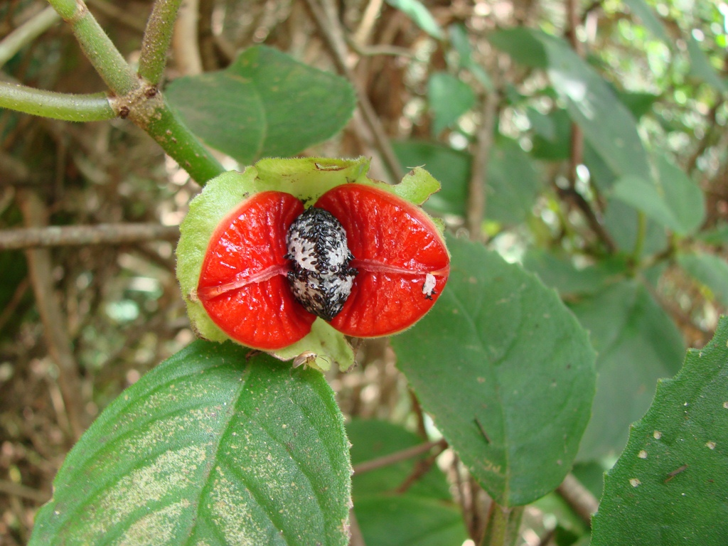 Drymonia serrulata (Poepp.) Wiehler - GESNERIACEAE - Parque Estadual dos Pirineus - Pirenópolis - Goiás - Brasil.